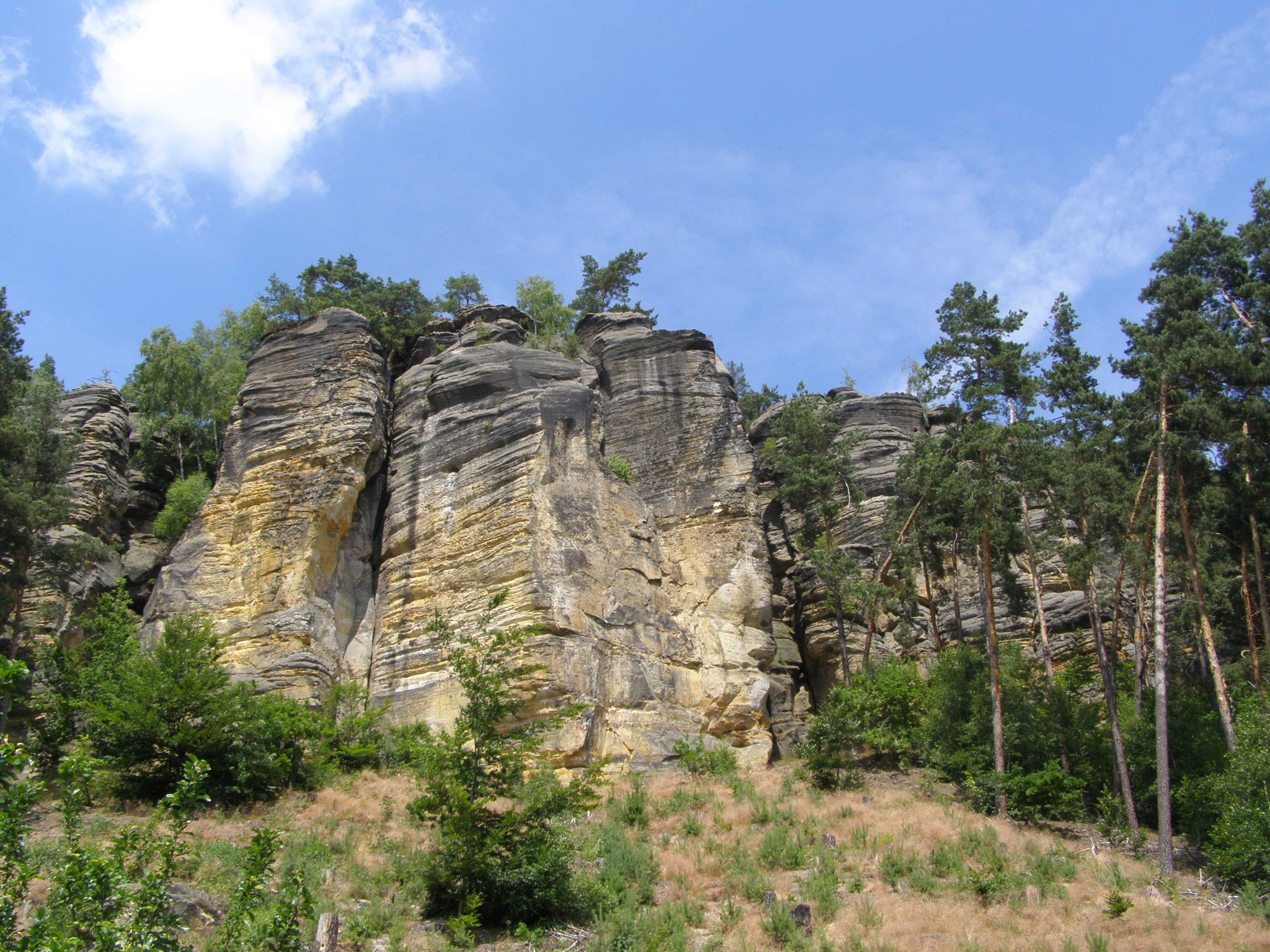 Cvikovská pahorkatina, skály na západním úbočí vrcholu Tisový vrch (540 m) v obci Svojkov